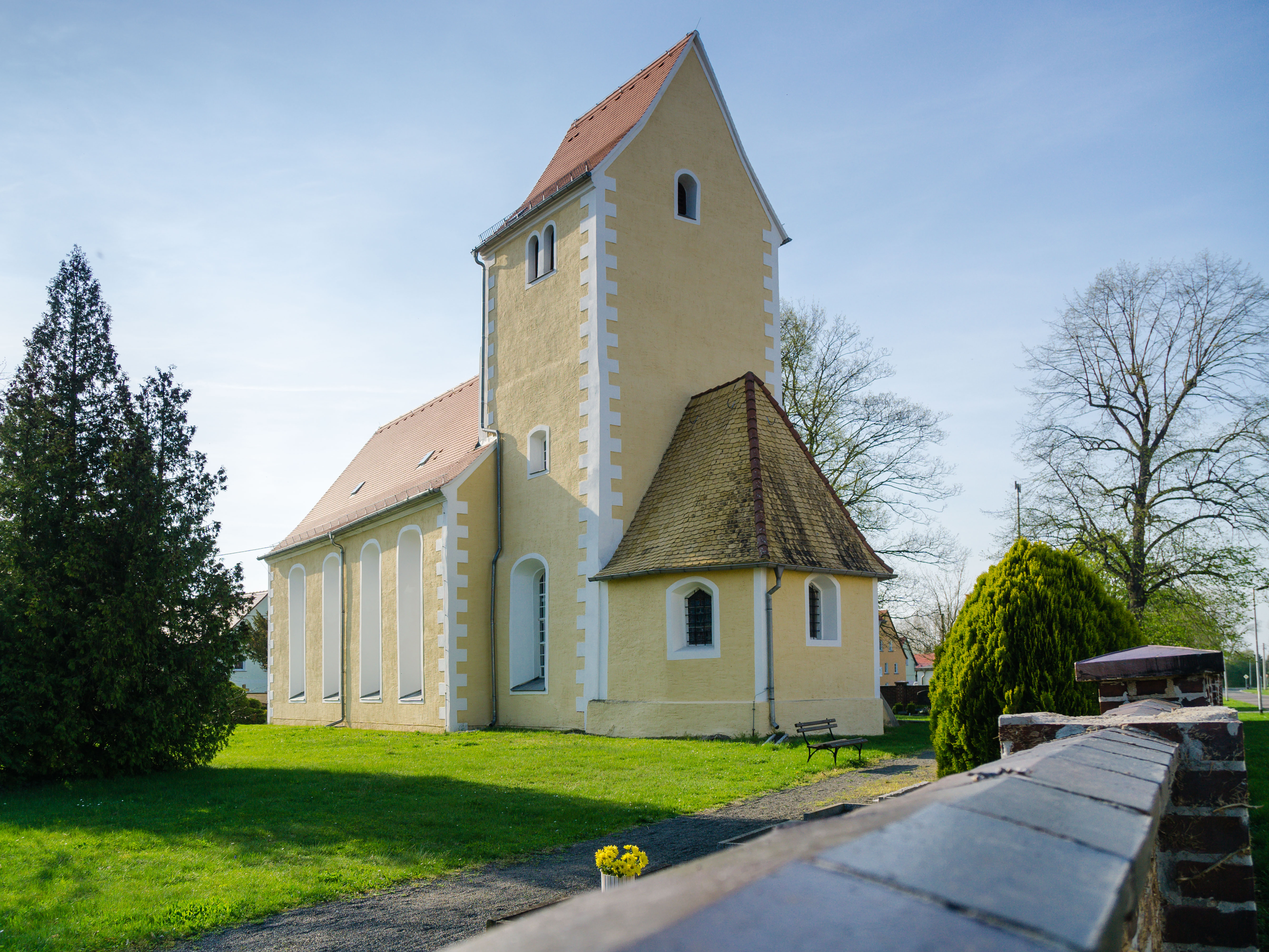 Kirche Schulstraße in Bennewitz OT Deuben